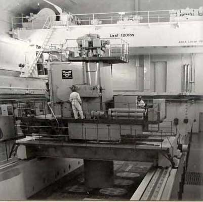 Reaktor R3 på Ågestaverket i Huddinge